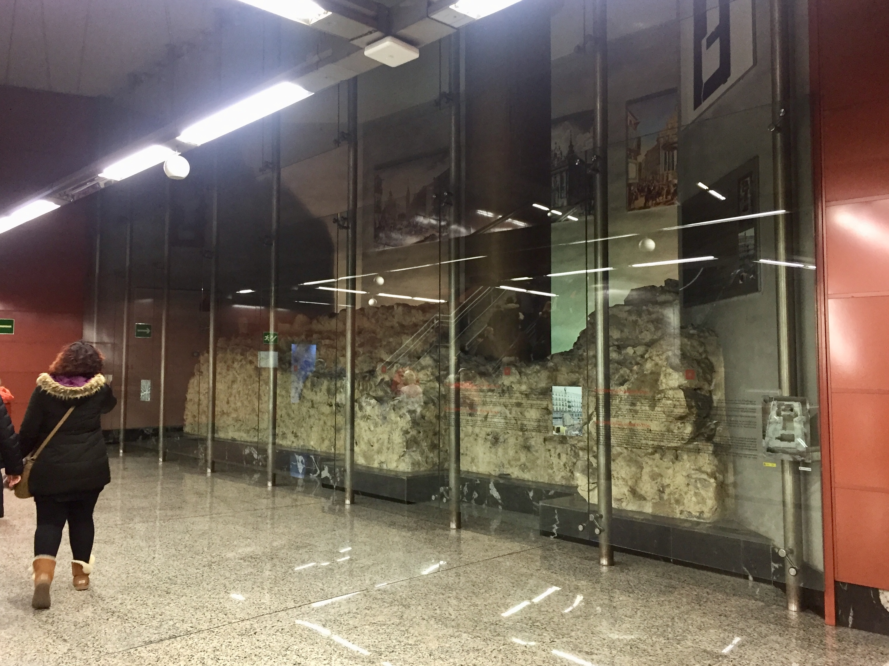 Ventana arqueológica de la Estación de Sol de ferrocarril (Madrid, España), donde se muestran los restos del antiguo hospital y primera iglesia del Buen Suceso.